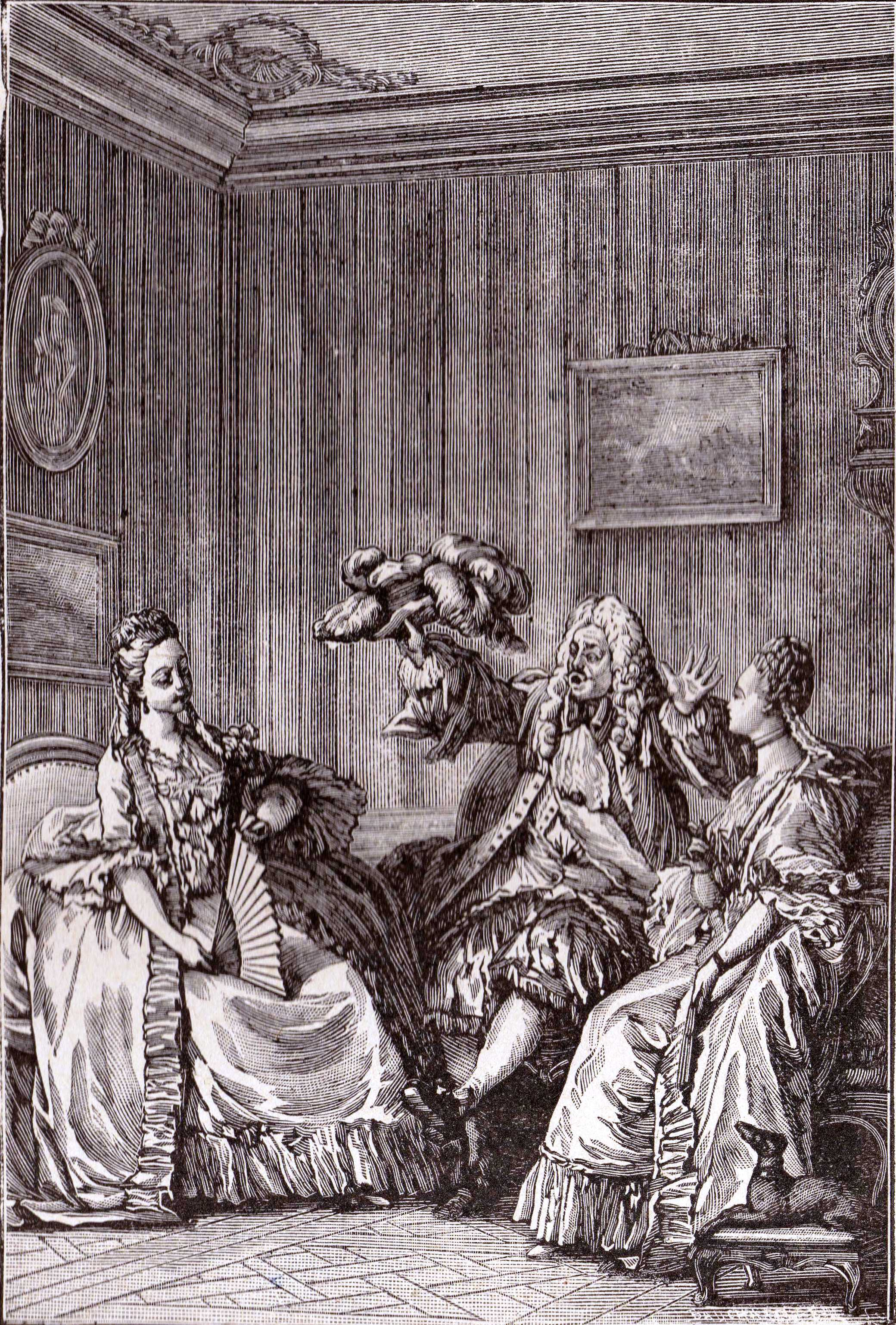 Molière - Les Précieuses ridicules Reproduction published before 1913 in Lavergne J. - Molière - Société française d'imprimerie et de librairie (Paris) - Scan : B.navez - 18 JAN 2006